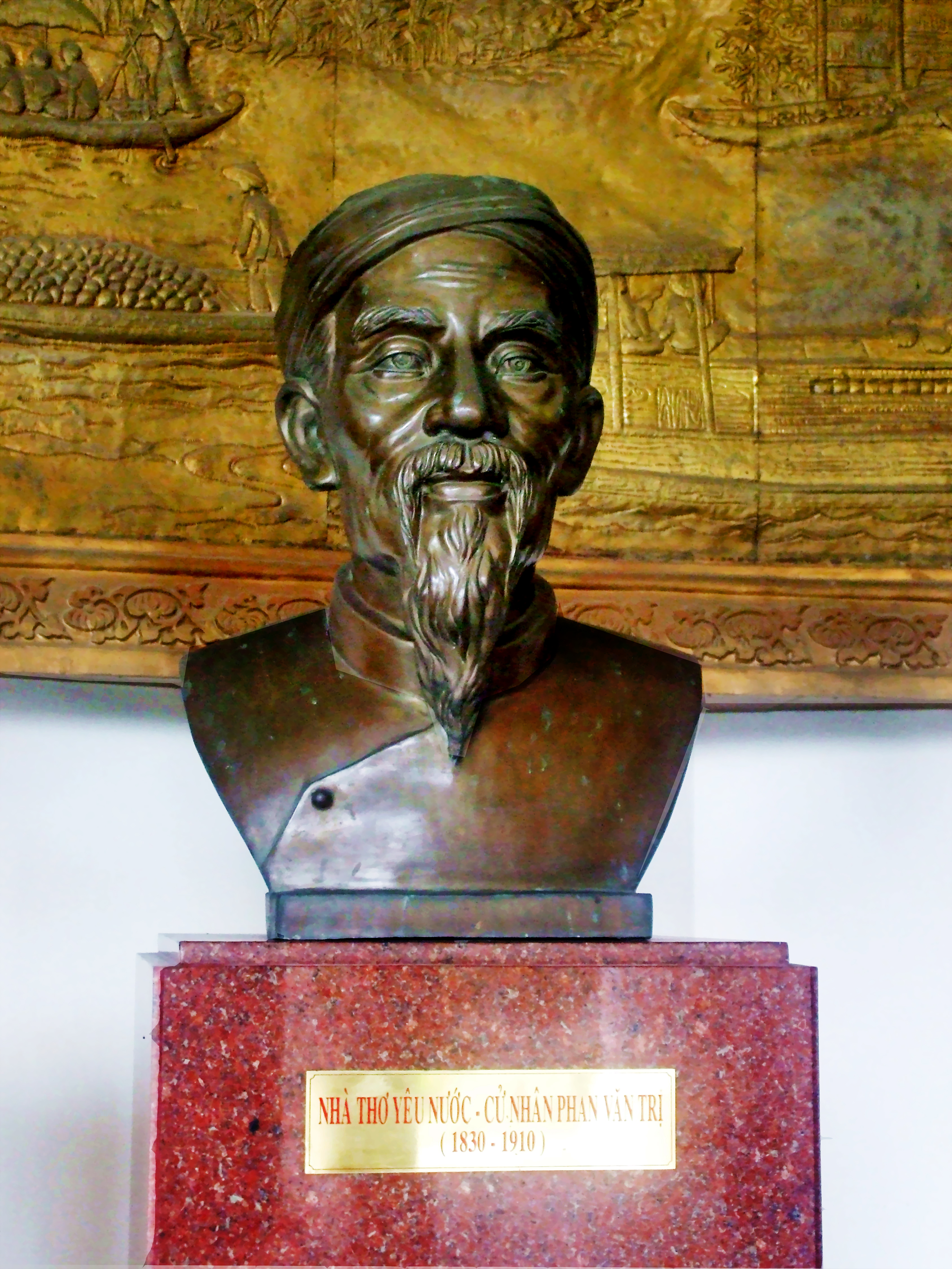 Tượng Phan Văn Trị tại Nhà bảo tàng thành phố Cần Thơ.